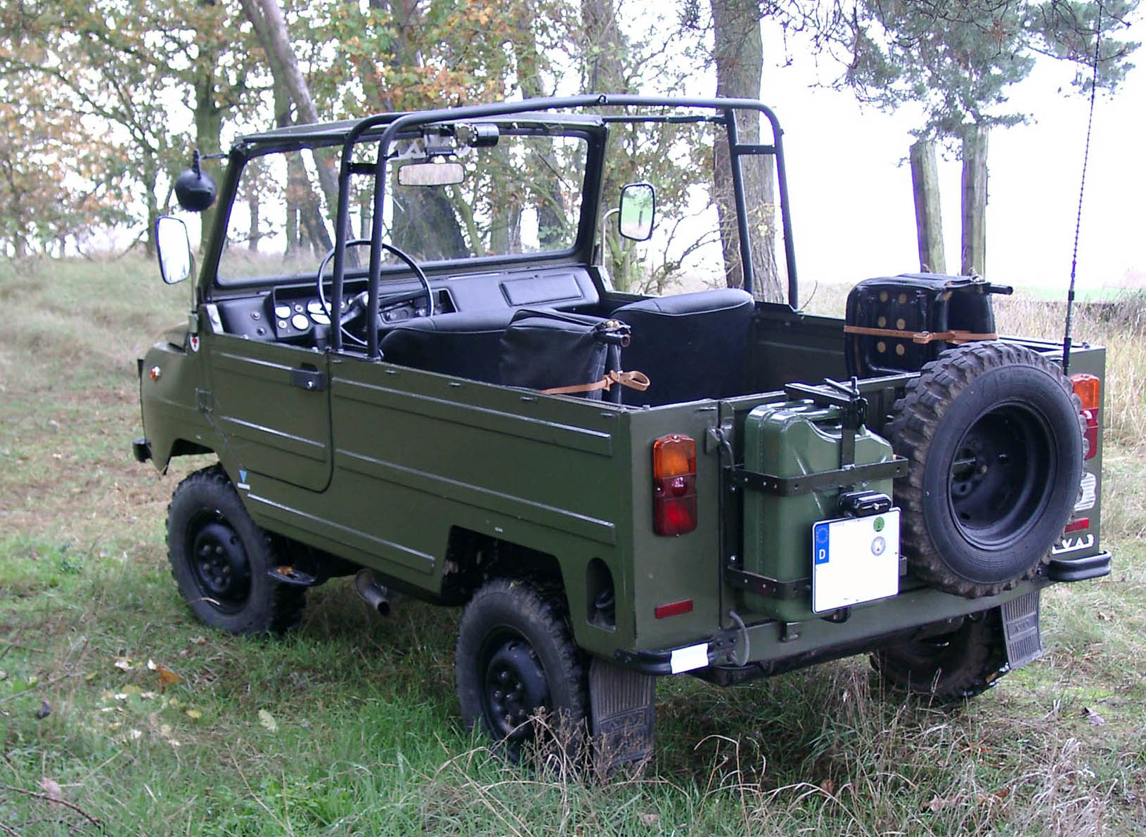 LuAZ 969m Rückansicht